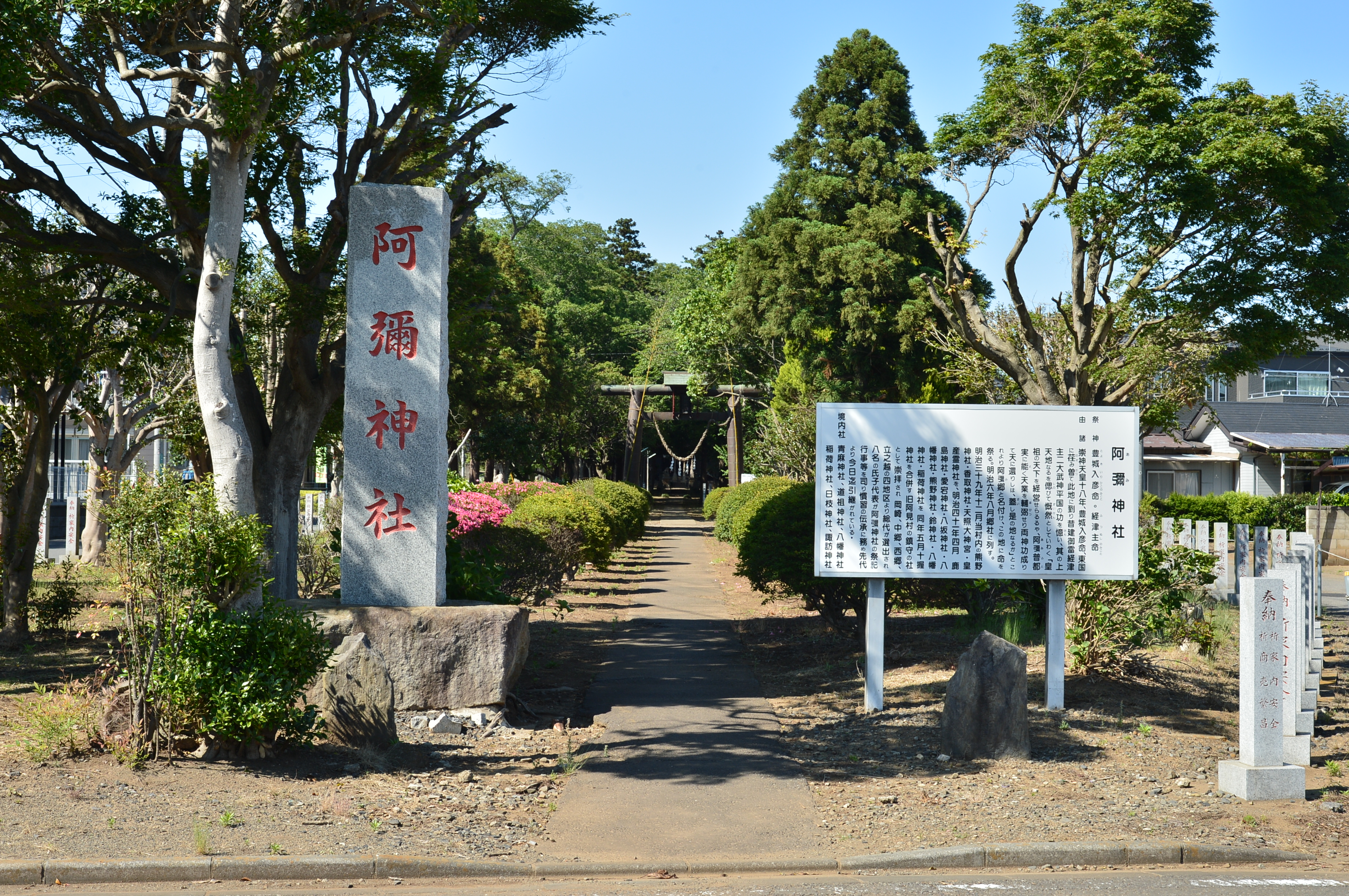 阿彌神社の入口（稲敷郡阿見町）